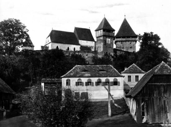 Almaschken, Romänien